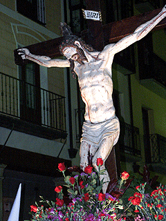 Detalle de la imagen del Cristo del Humilladero (s. XVI) atribuido a Juan de Juni o su escuela. Una de las imágenes más bella que puede admirarse en la Semana Santa Soriana.